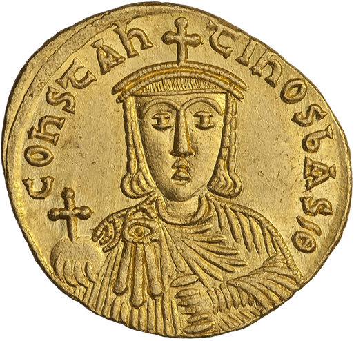 Солид. Константин VI и Ирина. 793—979 гг. (реверс). Погрудный портрет императора без бороды, в короне с крестом и хламиде, в правой руке держава, в левой — акакия.